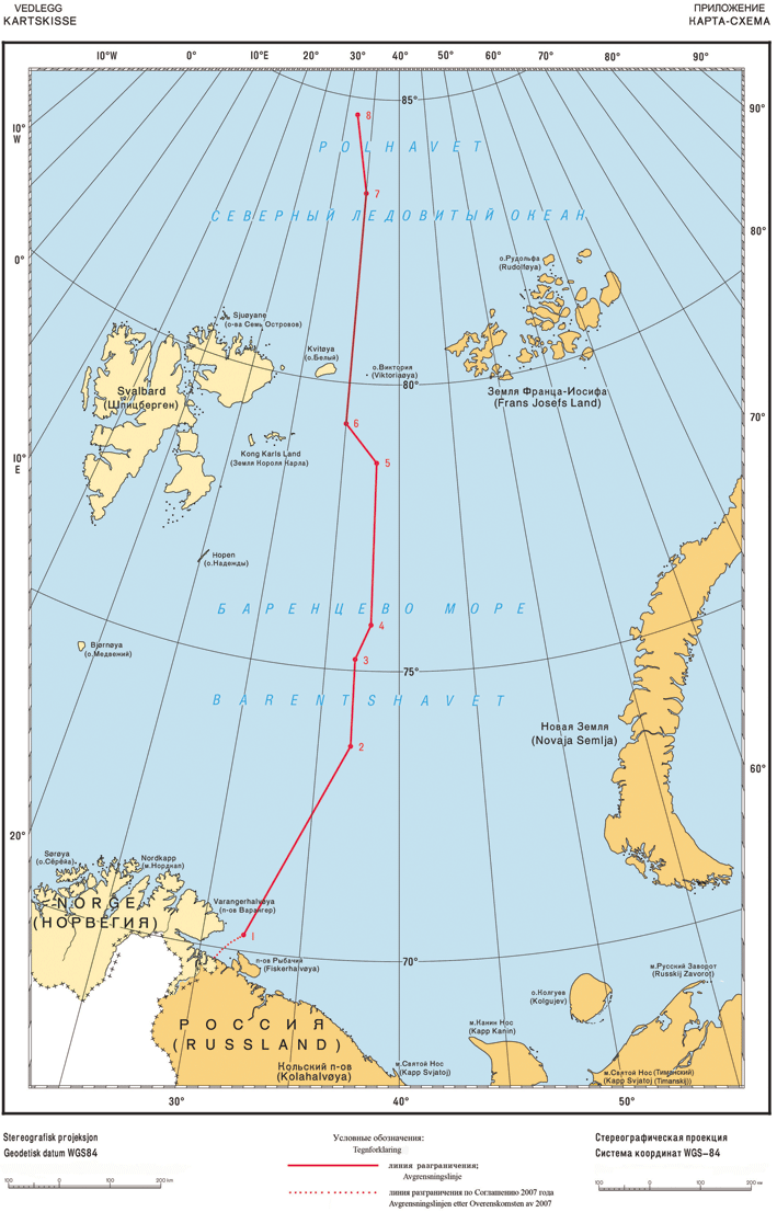 Delelinjen i Barentshavet.